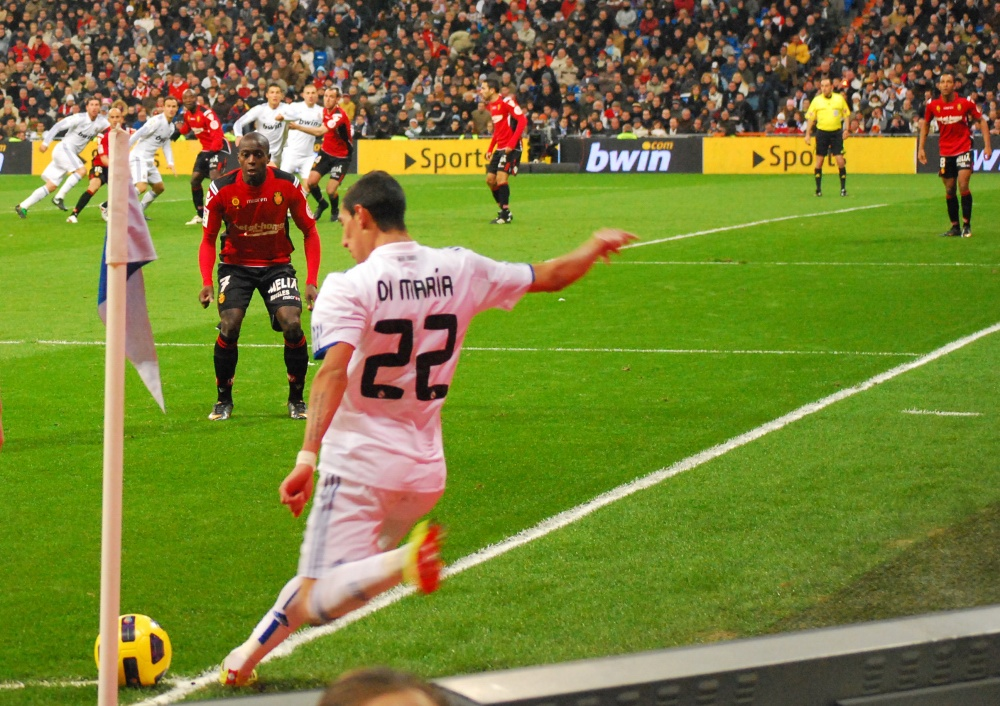 Di María sacando un corner, en un partido de La Liga. Real Madrid 1 - Real Mallorca 0